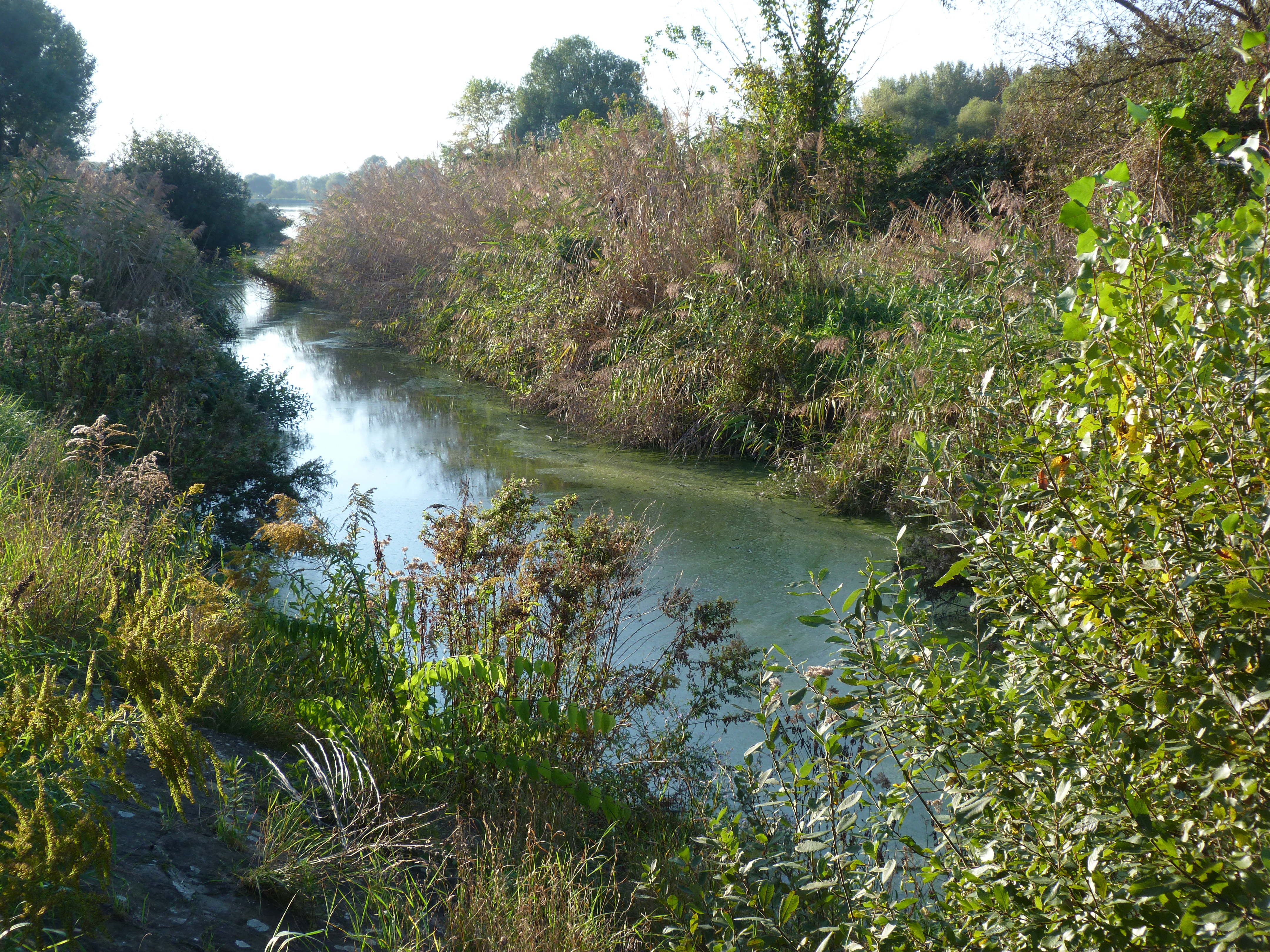 A felvétel 2014. szeptember 28-án, vasárnap készült Budapesten, a Naplás tónál (XVI. kerület). Szilas patak. ©© Derzsi Elekes Andor, Budapest 2014, You are authorised to use these photos and vids under Creative Commons – even for commercial, for profit purposes. Photos must be attributed to Derzsi Elekes Andor. All of the photos and vids in the Metapolisz DVD line are under Creative Commons and can be used even for commercial – for profit – purposes. Recommended Citation Derzsi Elekes Andor: Metapolisz DVD line